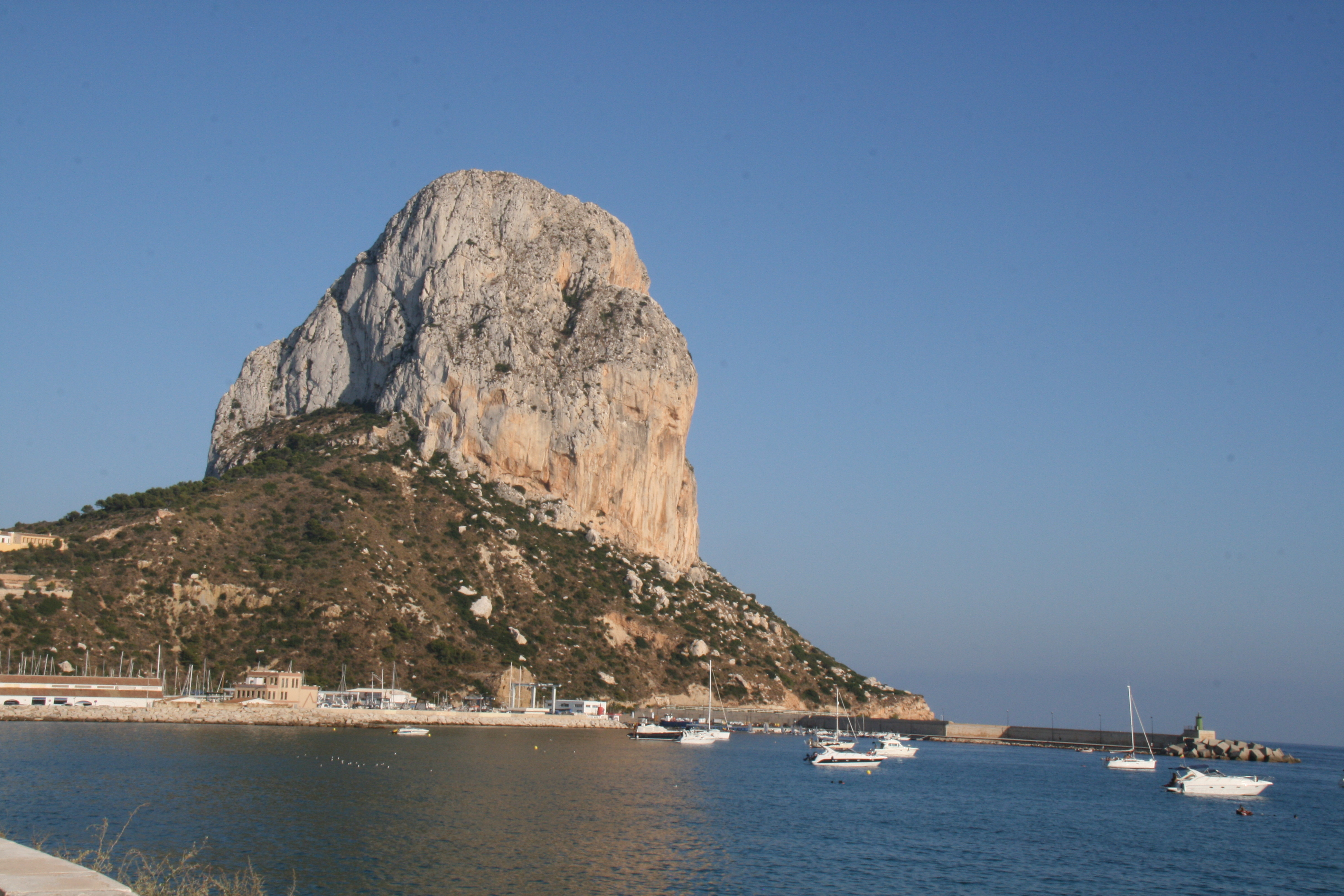 Peñón de Ifach (en el municipio de Calpe)